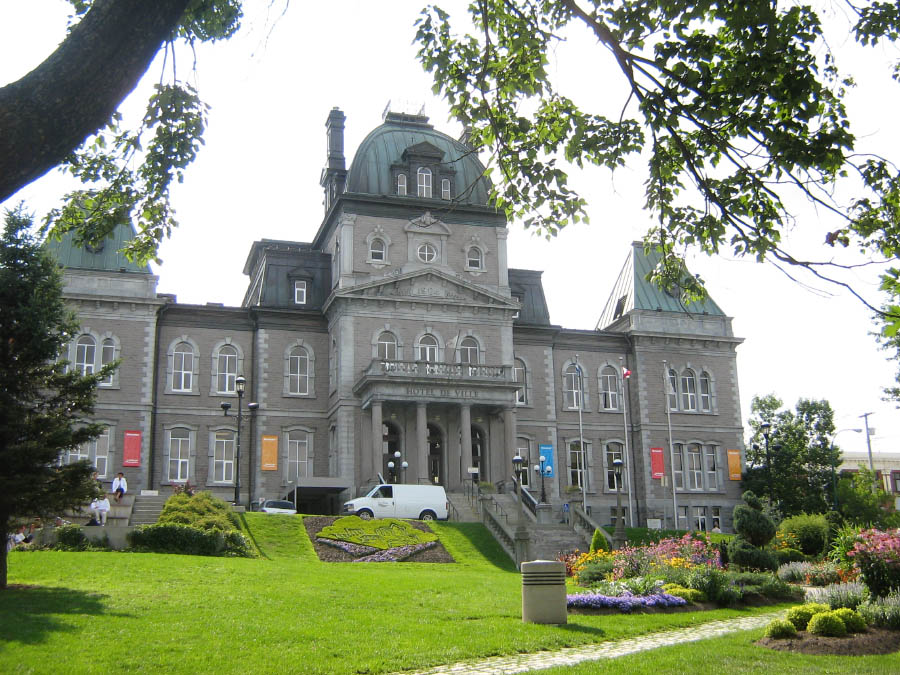 Hôtel de ville de Sherbrooke